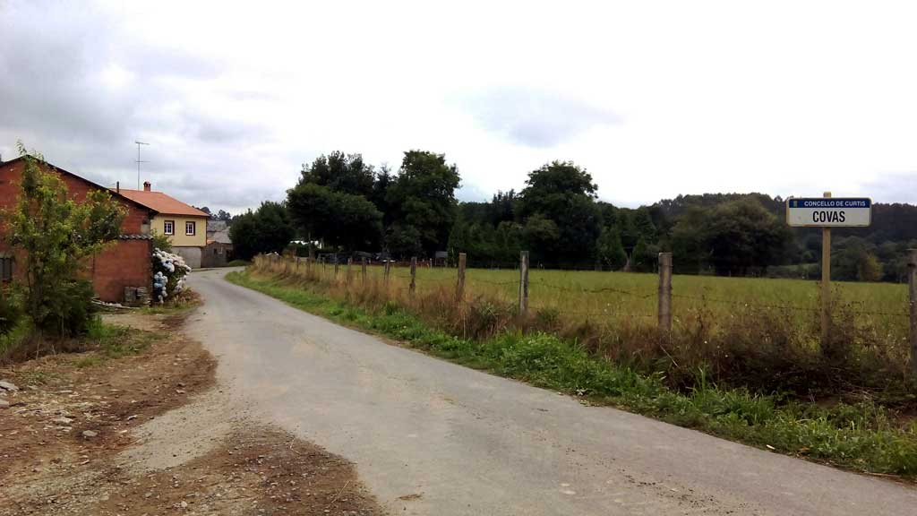 Vista de Covas, Curtis.